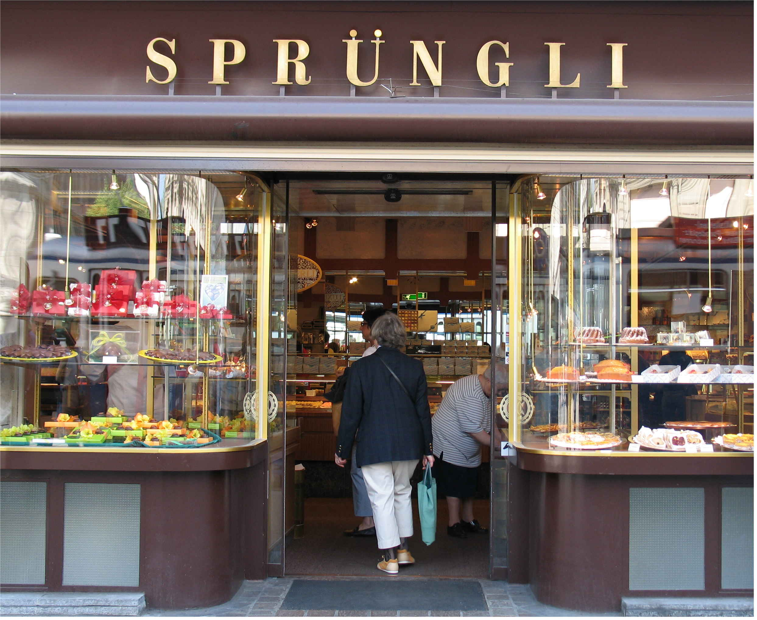 Entrée vun der Confiserie Sprüngli zu Zürich.